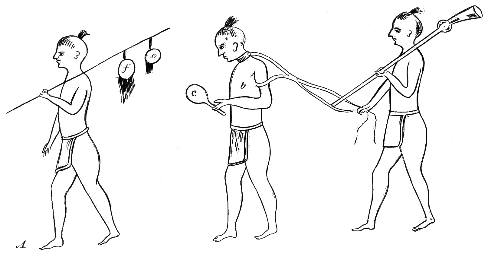 Volume 1, Page 7, Figures A-F, Prisoner